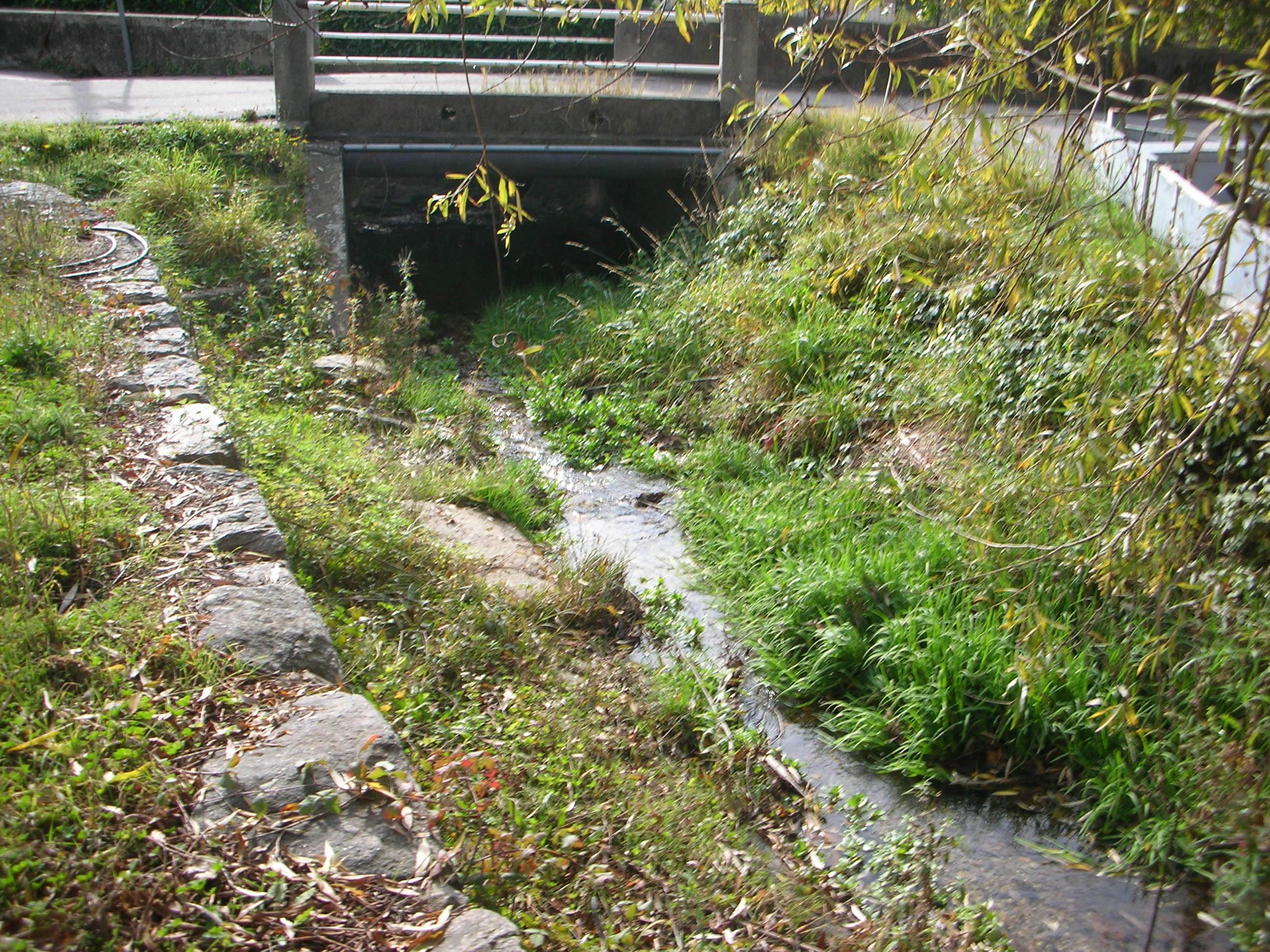 Il fiume Olona, ancora ruscello, poco dopo essere sgorgato dalla sorgente, in località Rasa di Varese.